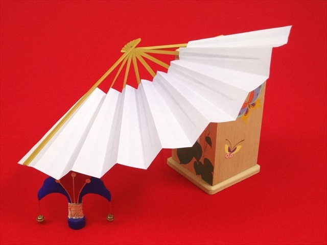 投扇興の銘定